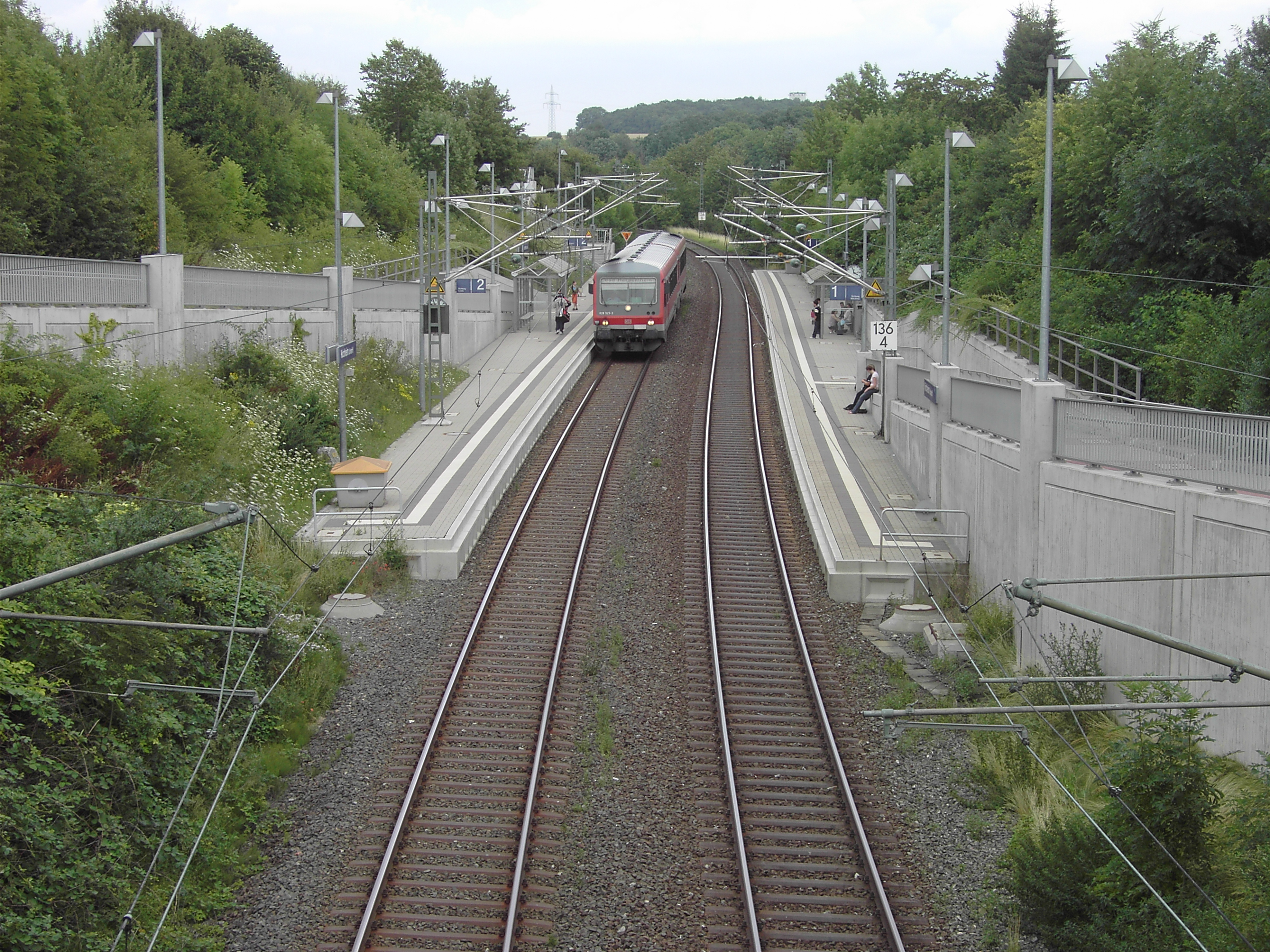 Ein VT 628 am neuen Haltepunkt in Kirchheim (Unterfr).